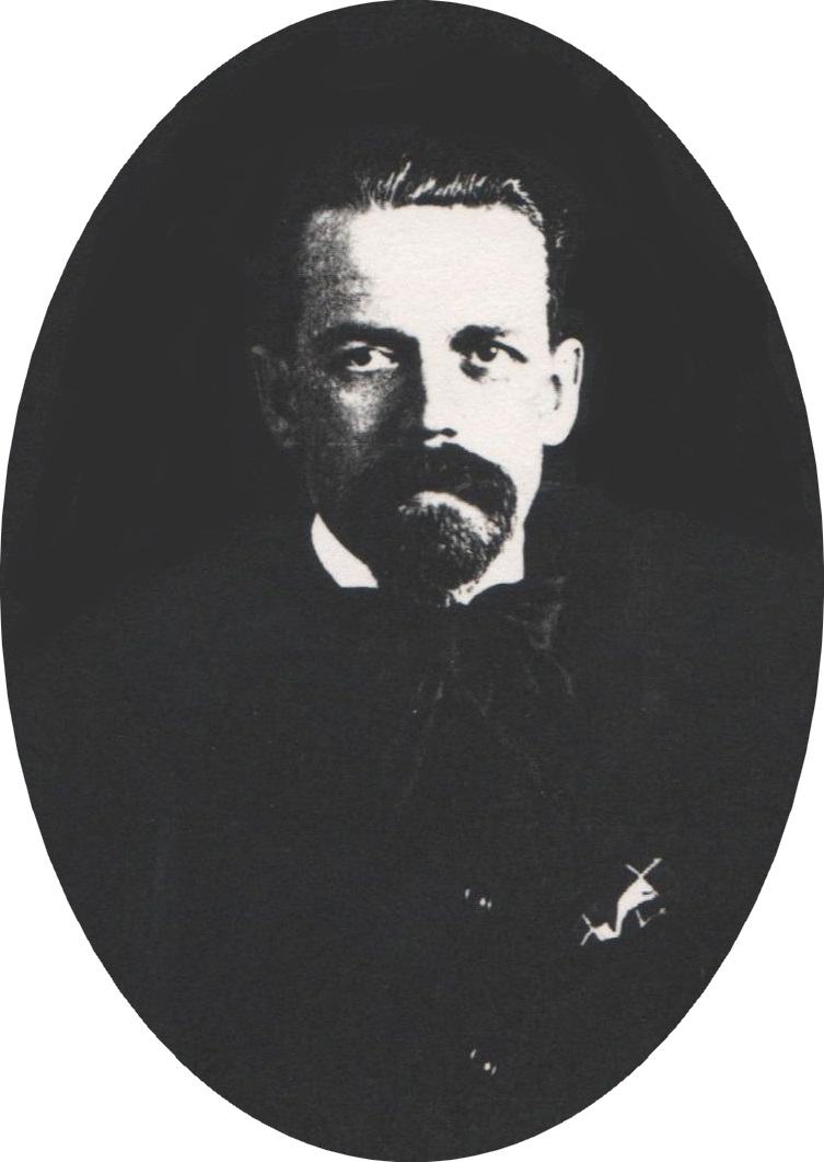 Portrait de Gabriel-Ursin Langé